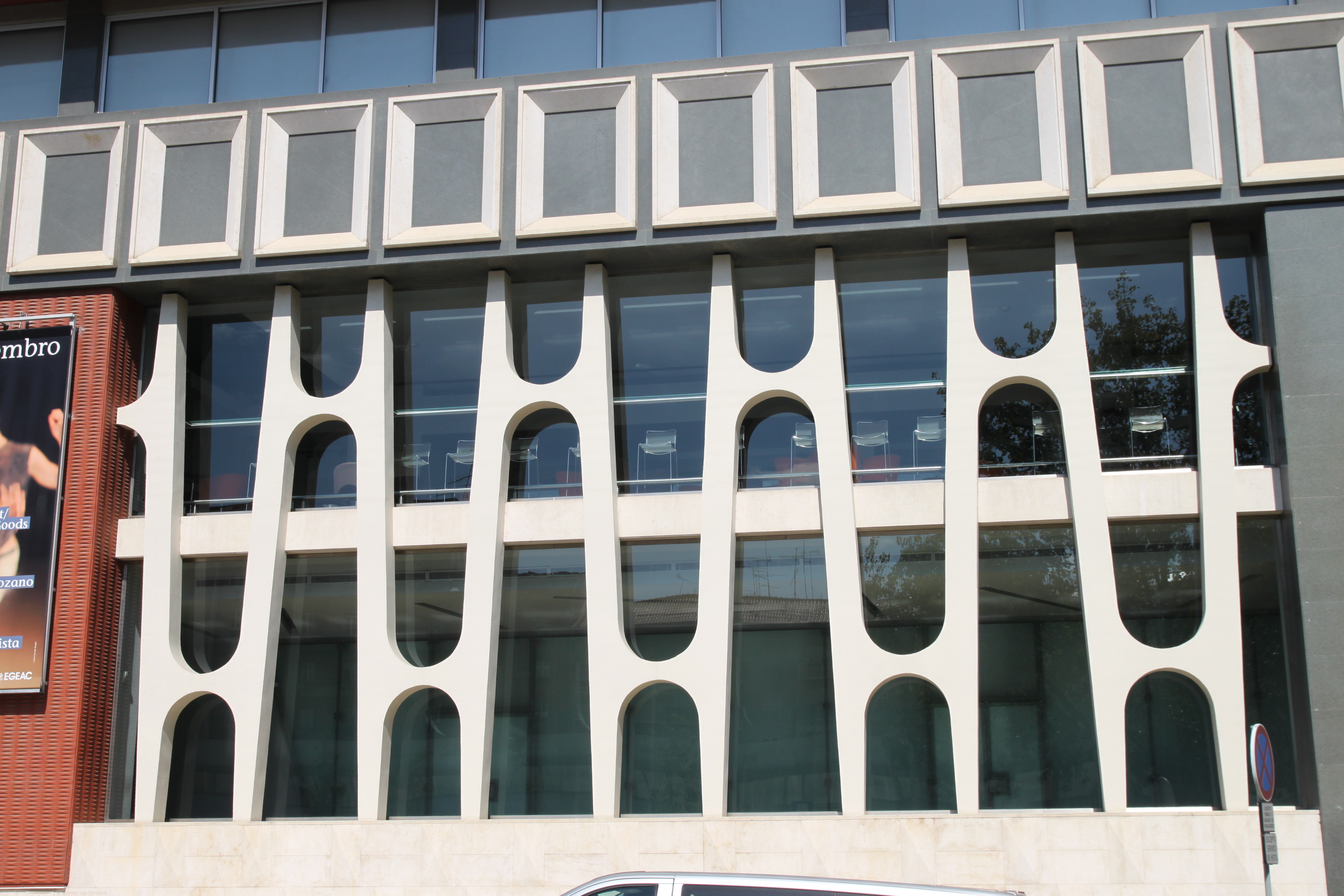 Teatro Municipal Maria Matos This file was uploaded for Wiki Loves Monuments in Portugal with the unique identifier 97011538.